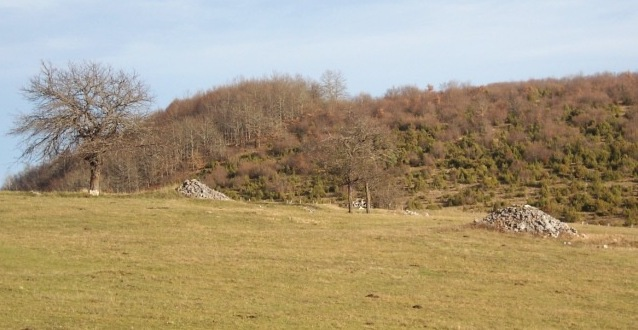 Громиле на Гласинцу.